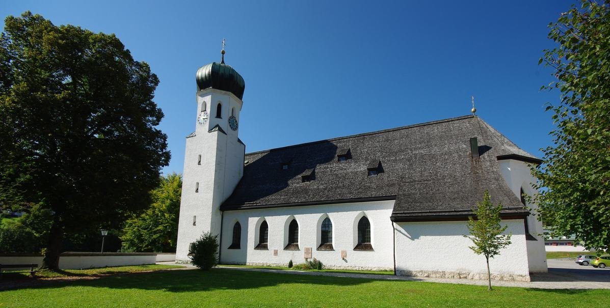 Rathausplatz 1, 83483 Bischofswiesen; Kath. Pfarrkirche Herz JesuThis is a photograph of an architectural monument.